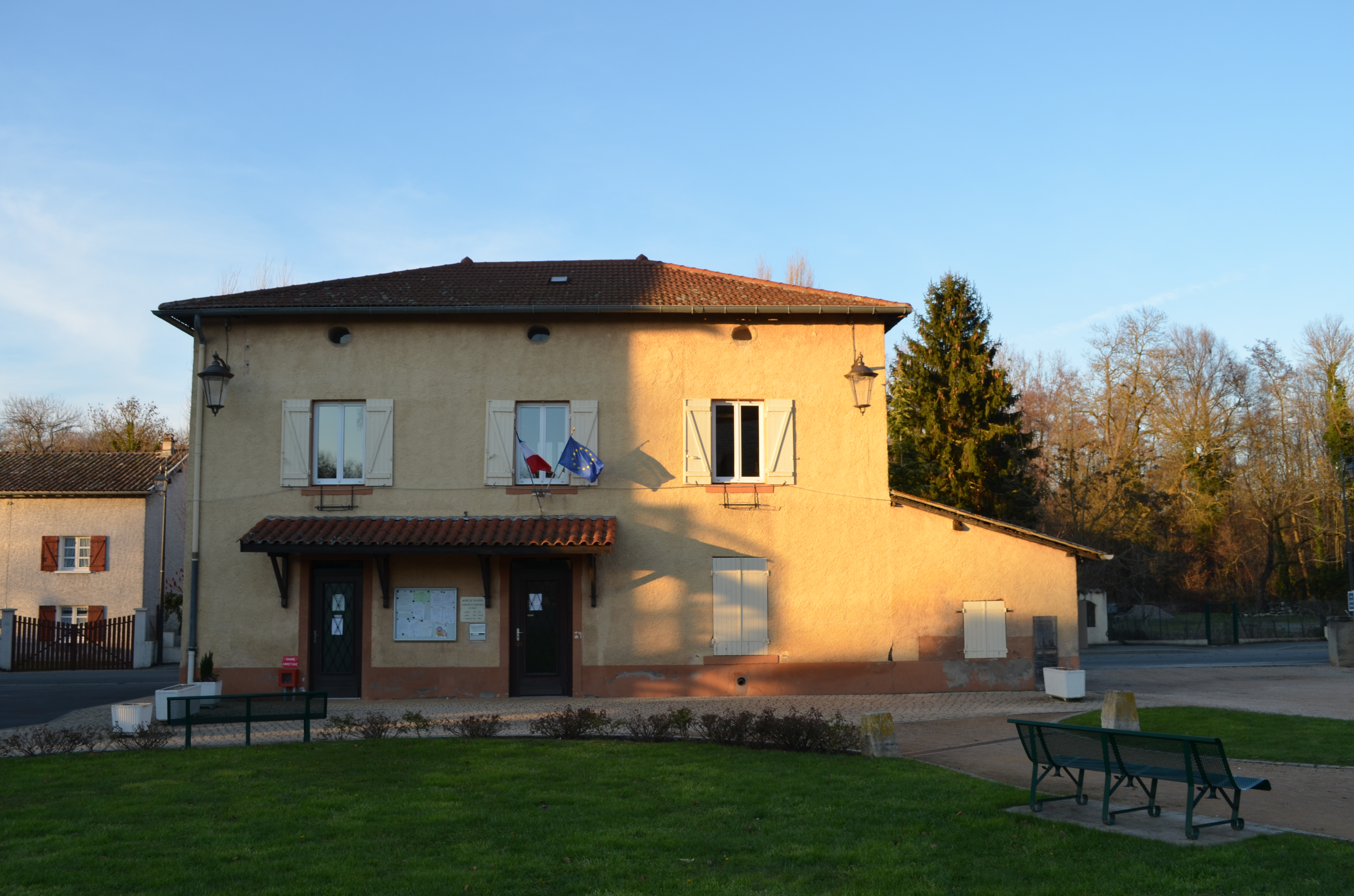 Mairie de Toussieux.